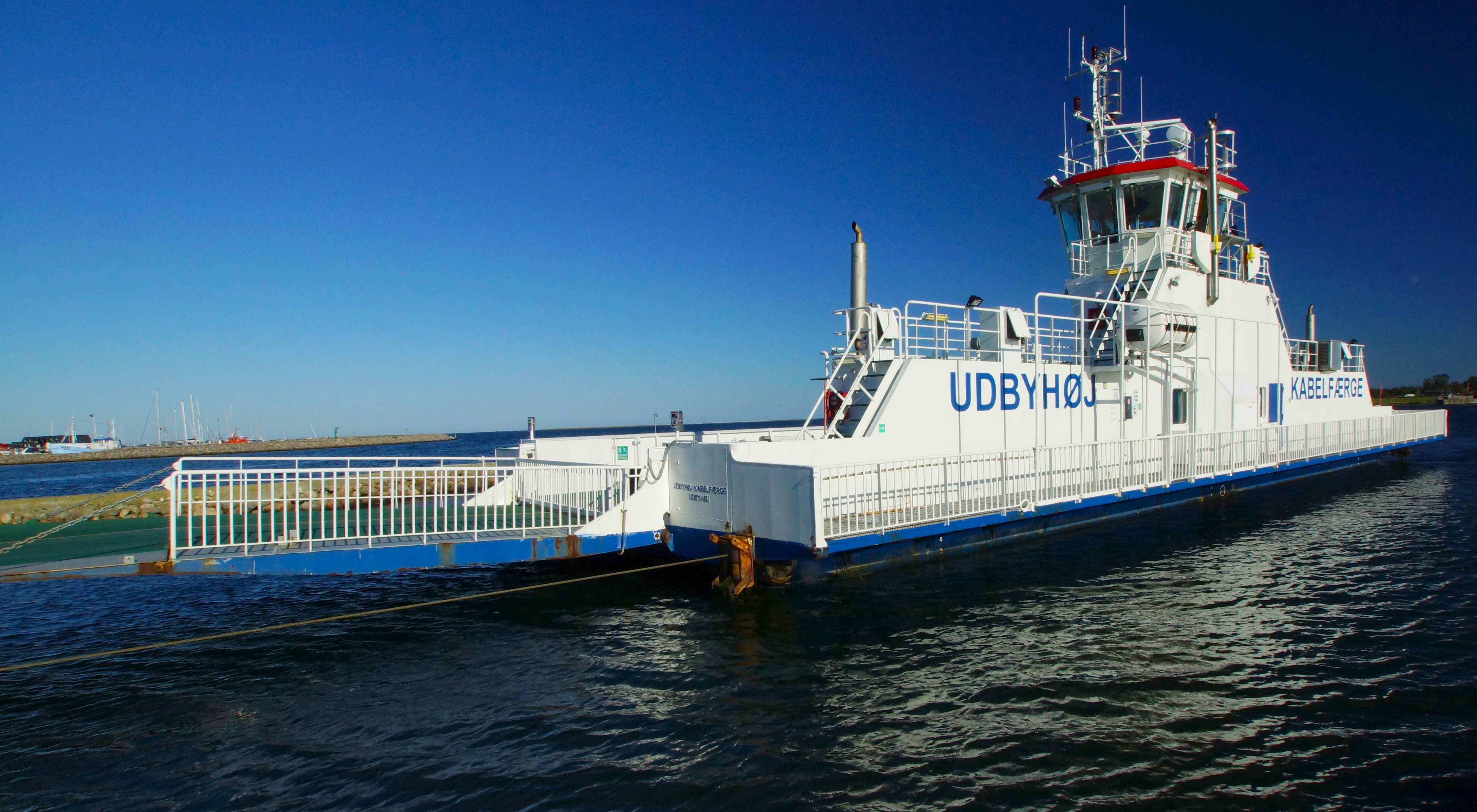 Udbyhøj Kabelfærge